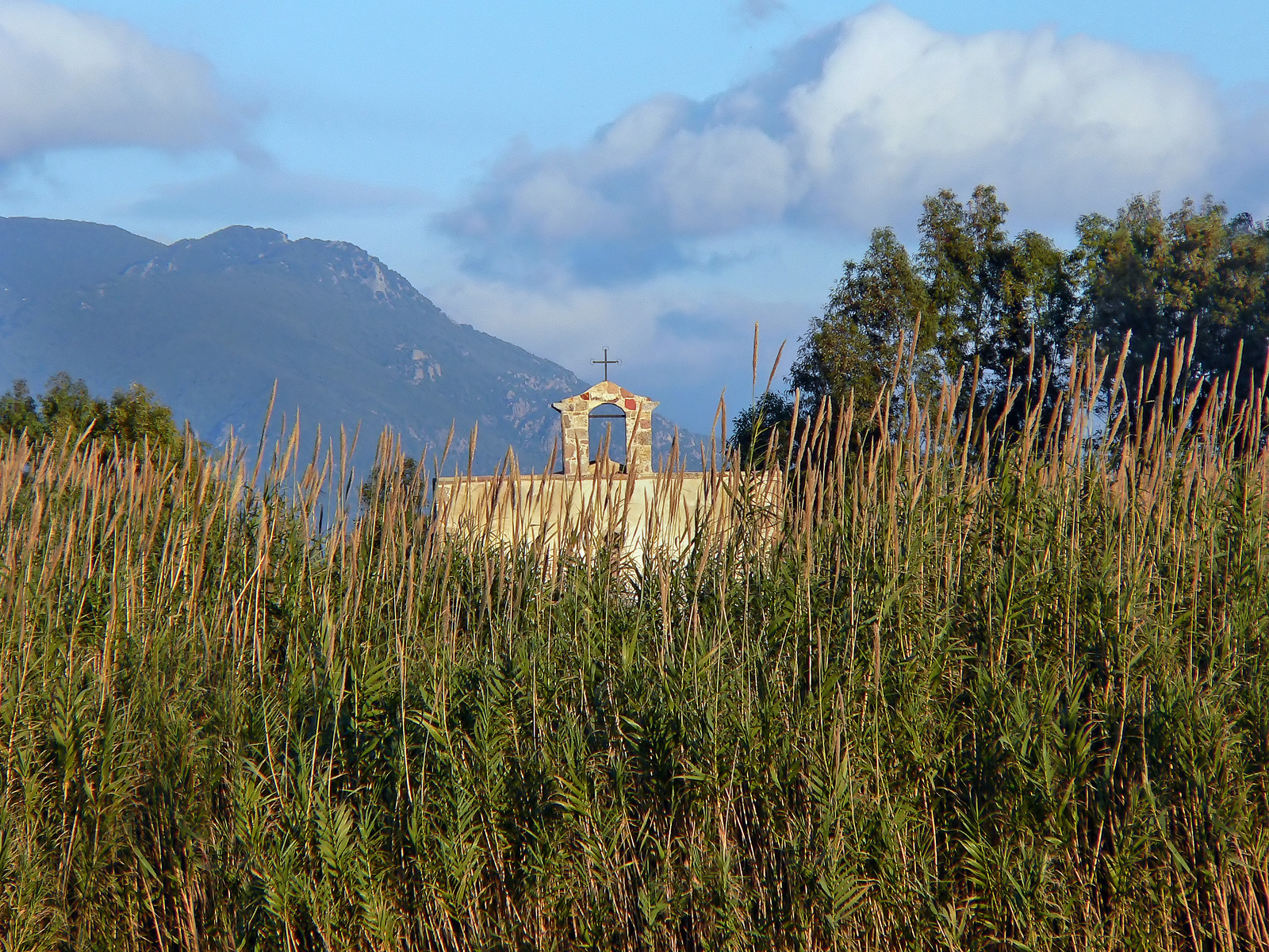 Giba-Villarios. La chiesa romanica di Santa Marta